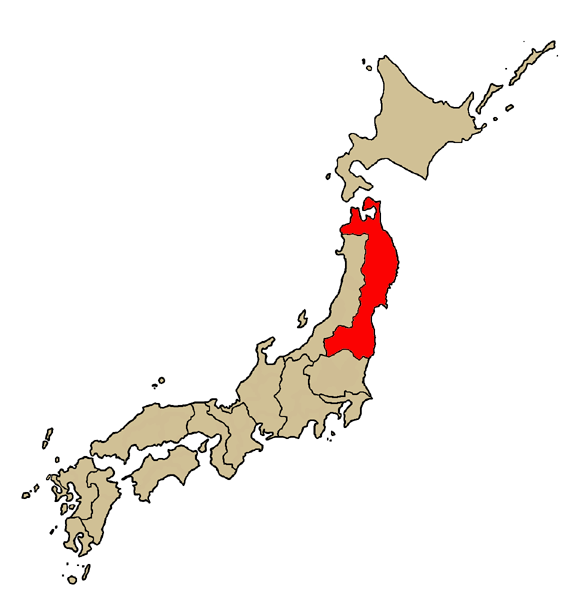 Mappa della diocesi cattolica di Sendai, in Giappone. Lavoro personale.